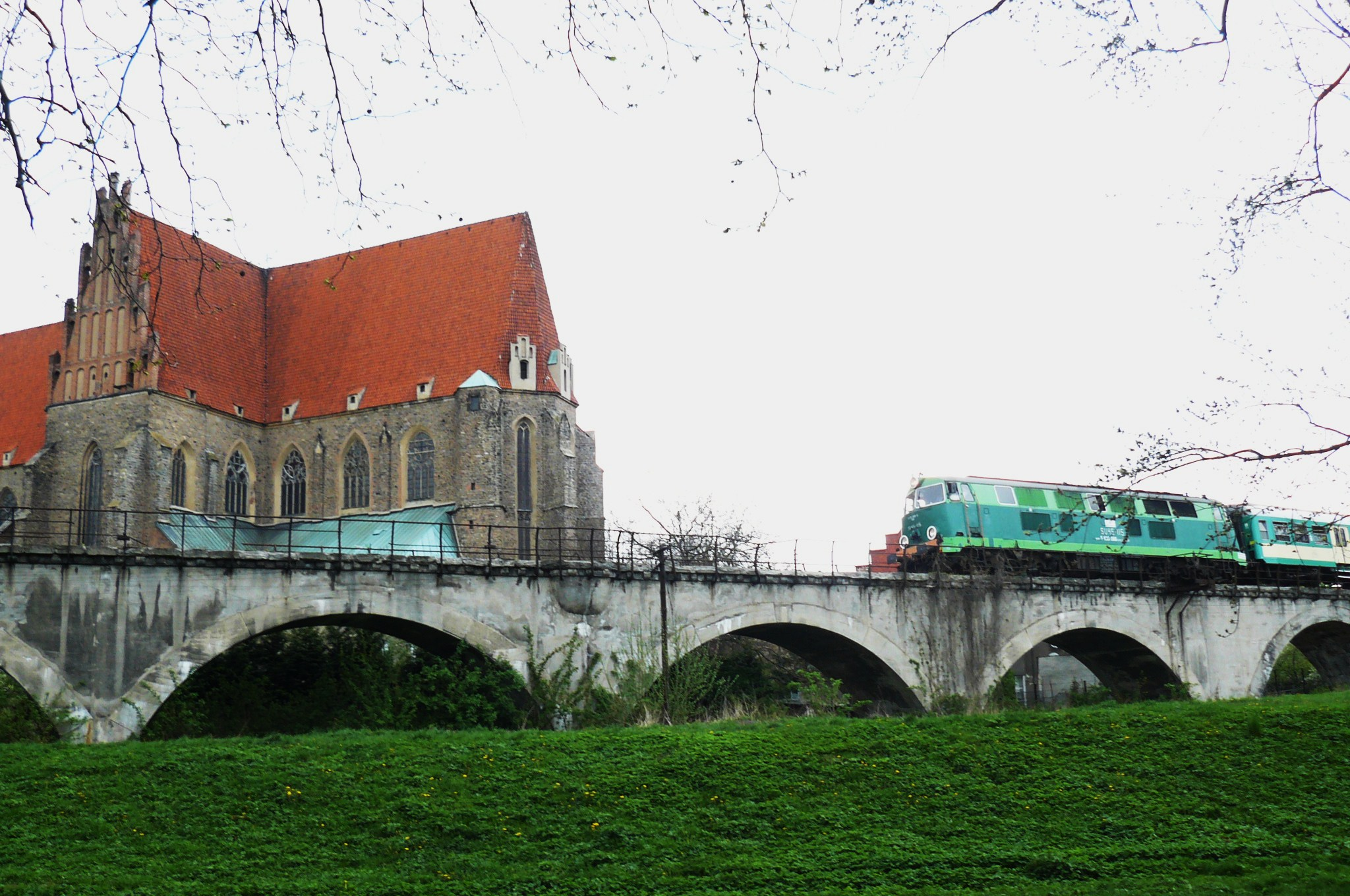 SU45-115 z pociągiem specjalnym "Dolnośląskie Zakamarki" (25.4.2015r.). Estakada pomiędzy Strzegomiem Miastem, a Grabiną Śląską.